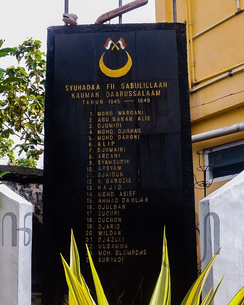 Monumen Askar Perang Sabil merupakan monumen yang berada di Kauman sebagai bentuk penghormatan para pemuda-pemuda Islam yang telah gugur dalam memperjuangkan kemerdekaan Indonesia.